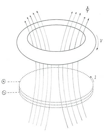 schema di propulsione spaziale secondo la teoria di Heim-Droescher